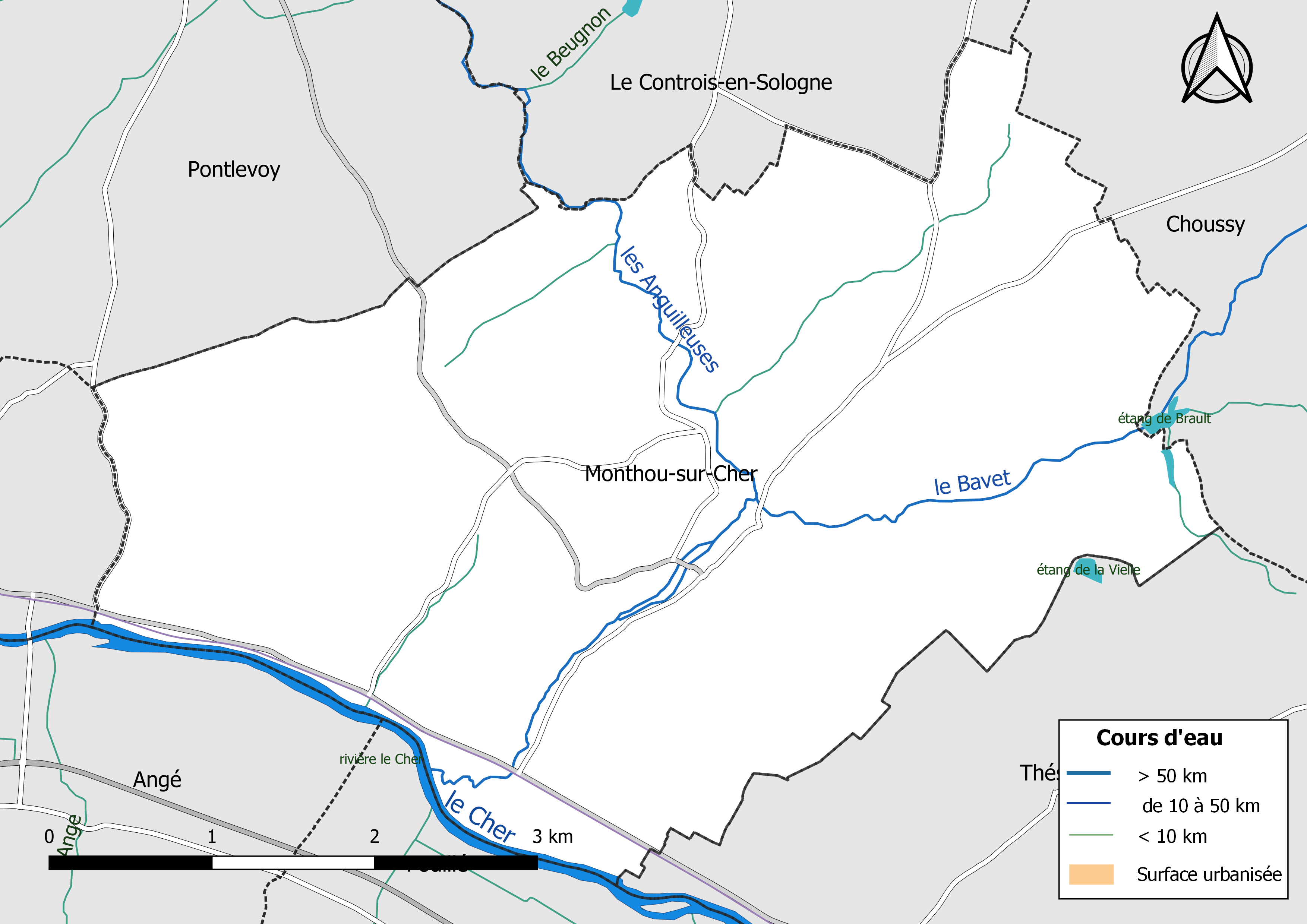 Carte du réseau hydrographique de la commune de Monthou-sur-Cher (Loir-et-Cher, France).